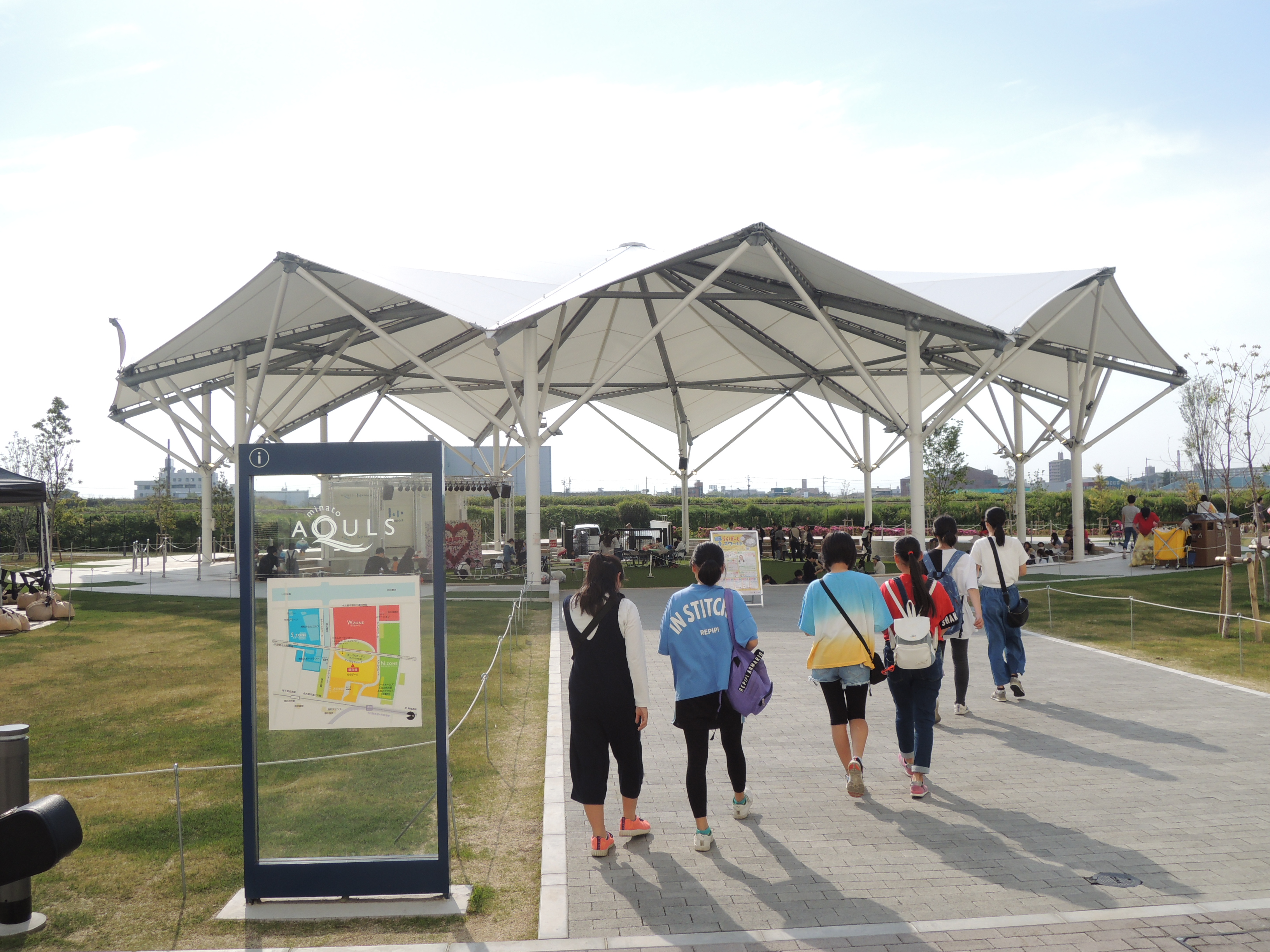 ららぽーと名古屋みなとアクルス 屋外イベントスペース デカゴン Nikon Coolpix P310